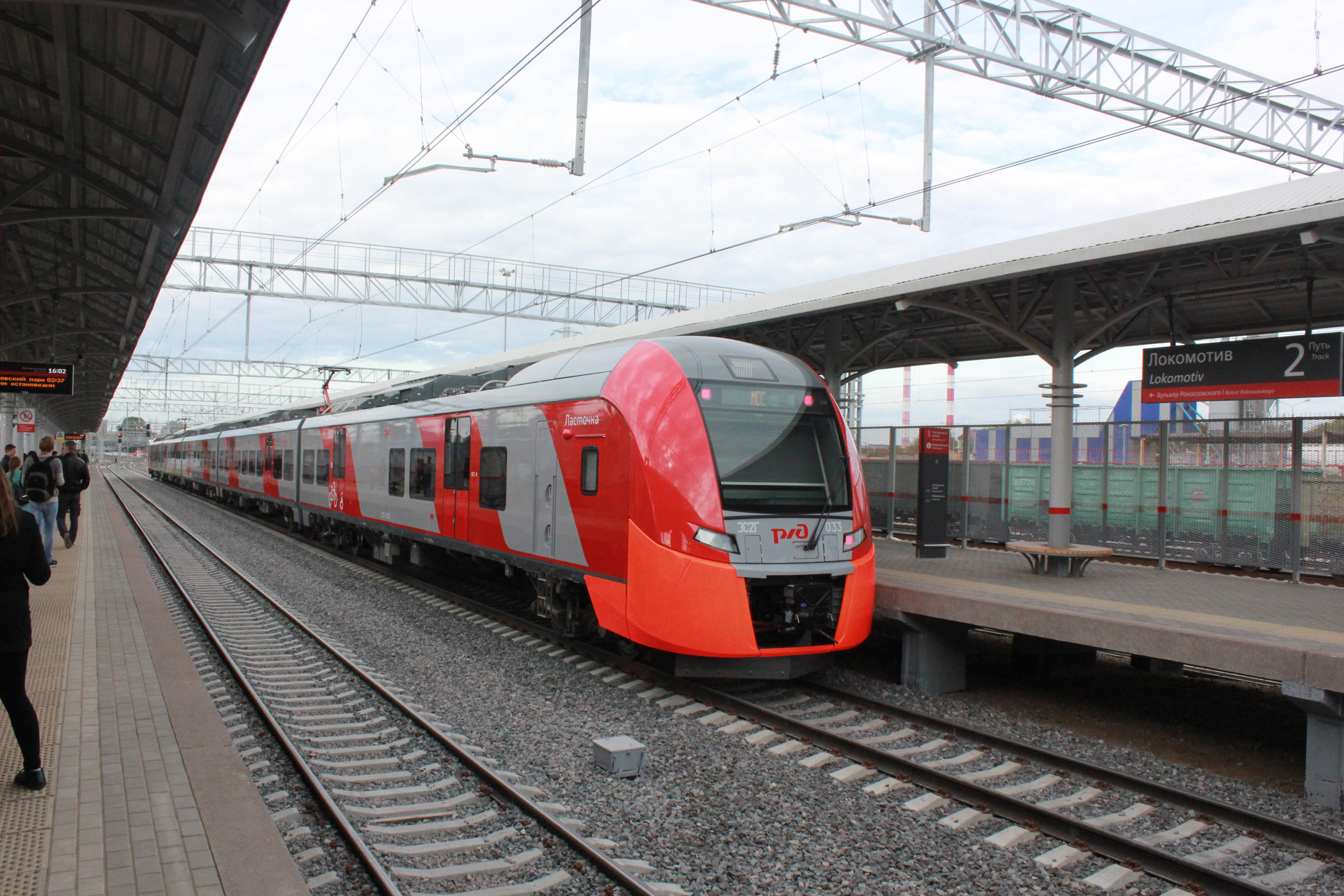 Электропоезд ЭС2Г-033 Ласточка на платформе Локомотив в день открытия пассажирского движения на МКЖД